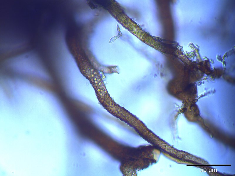 Zierliches Birnmoos (Bryum elegans), stark papillöse Rhizoide, Vergrößerung: 400x